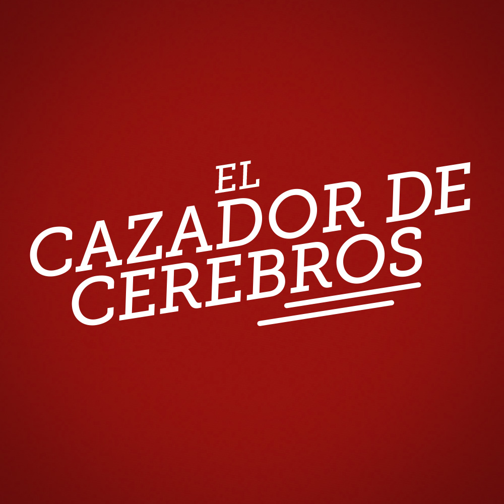 Logo oficial del programa de La 2 El Cazador de Cerebros